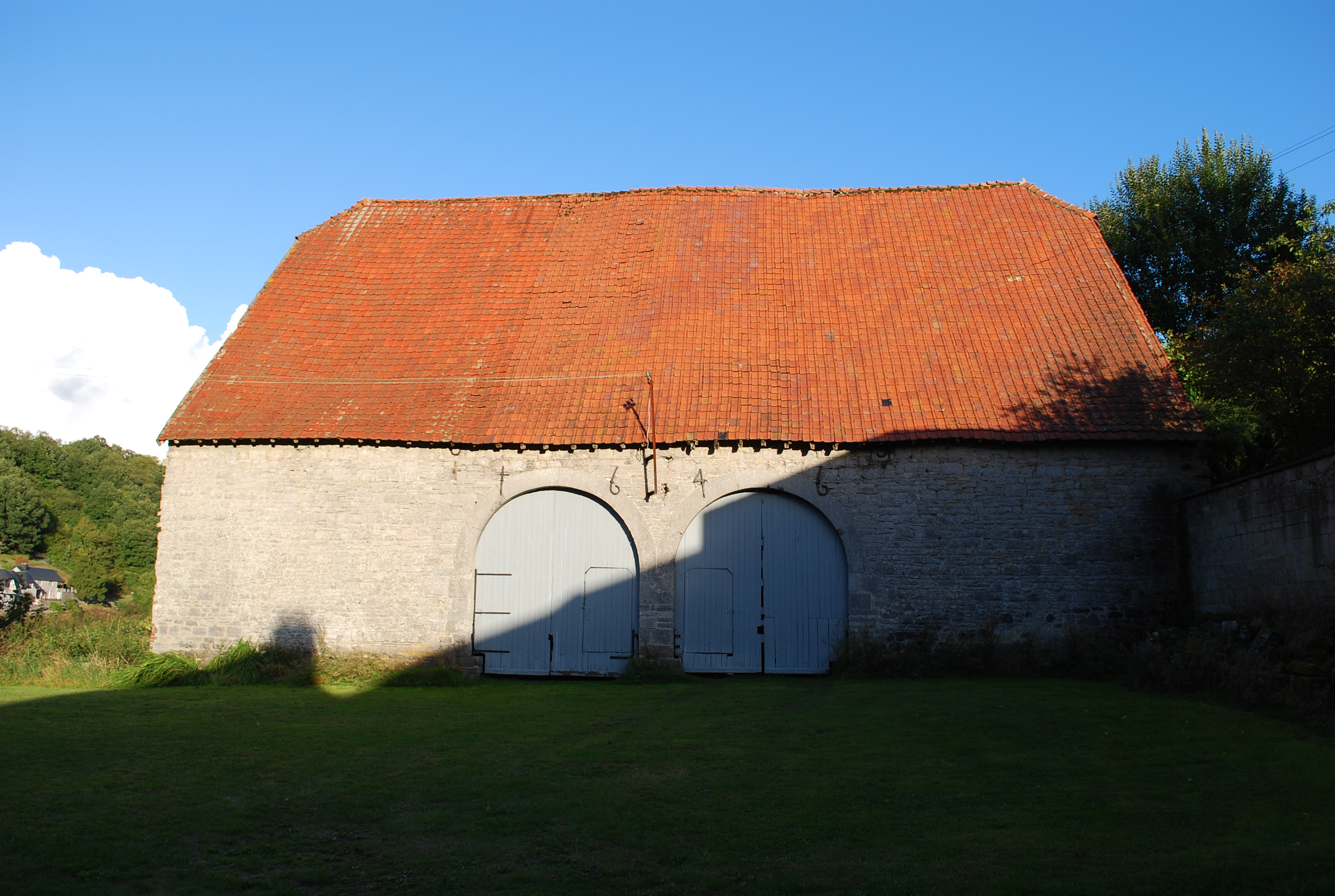 Grange bâtie en 1646 par l'Abbaye de Brogne afin de récolter la Dîme